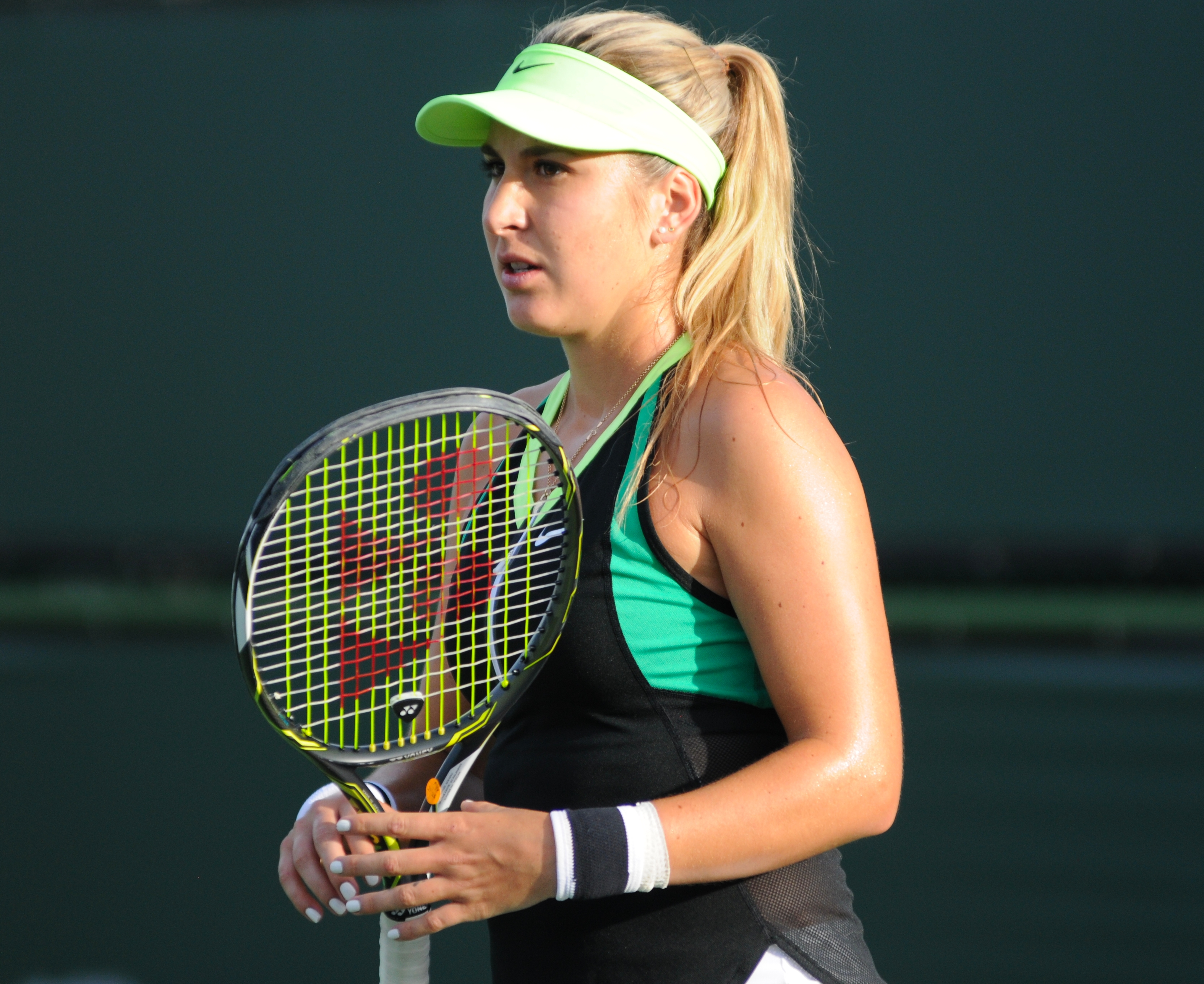 2017 BNP Paribas Open